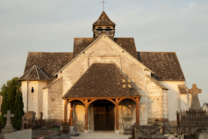 Église Saint-Remi de Saint-Remy-sous-Barbuise